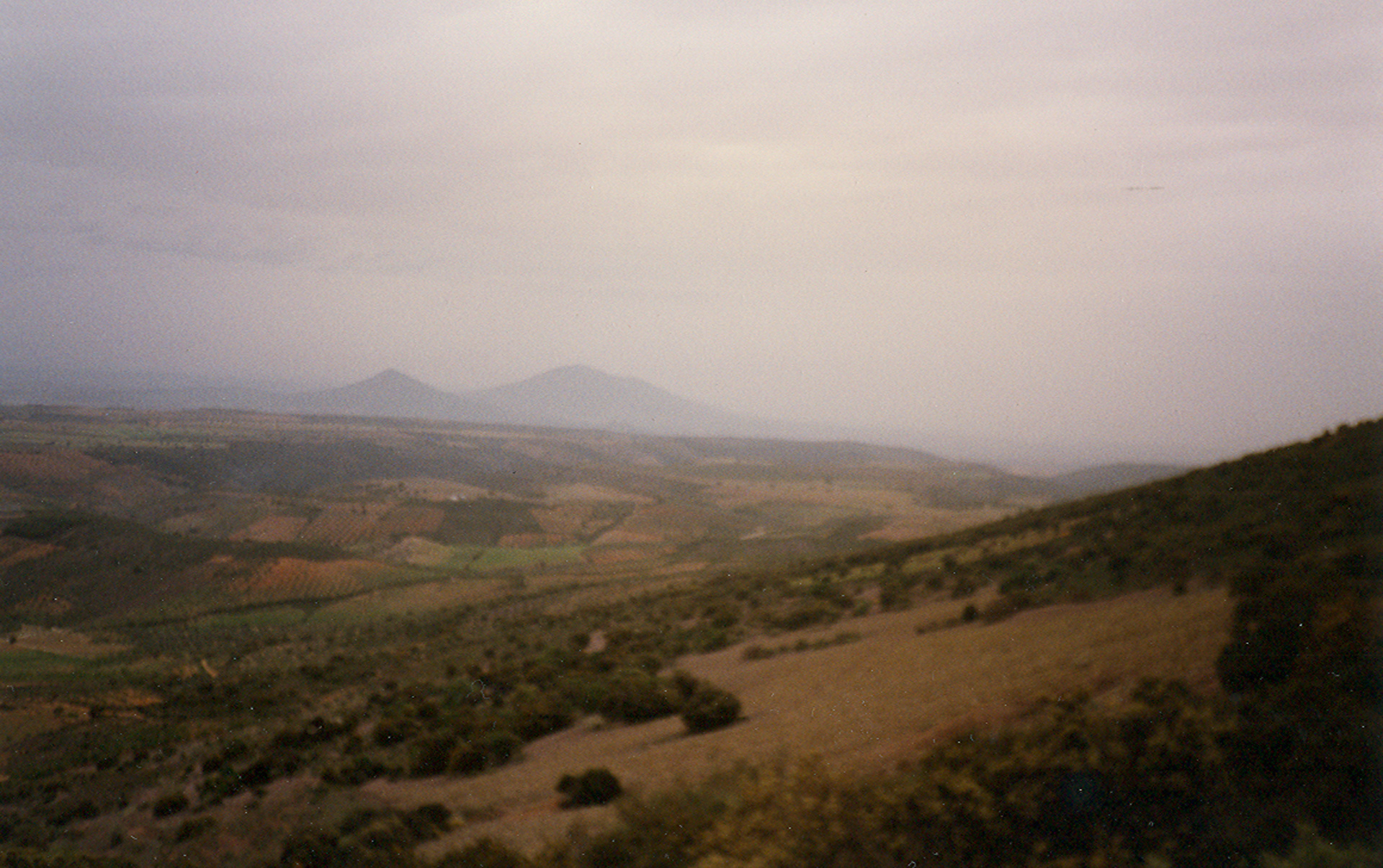 Mina de la nava de Ricomalillo This is a photography of a Site of Community Importance in Spain with the ID: ES4250012. Natura2000 entry, EEA entry